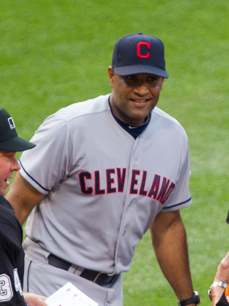 Sandy Alomar, Jr.